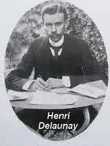 gravure d'Henri Delaunay, secrétaire général de la Fédération gymnastique et sportive des patronages de France, de la Fédération française de football et de l'Union des associations européennes de football